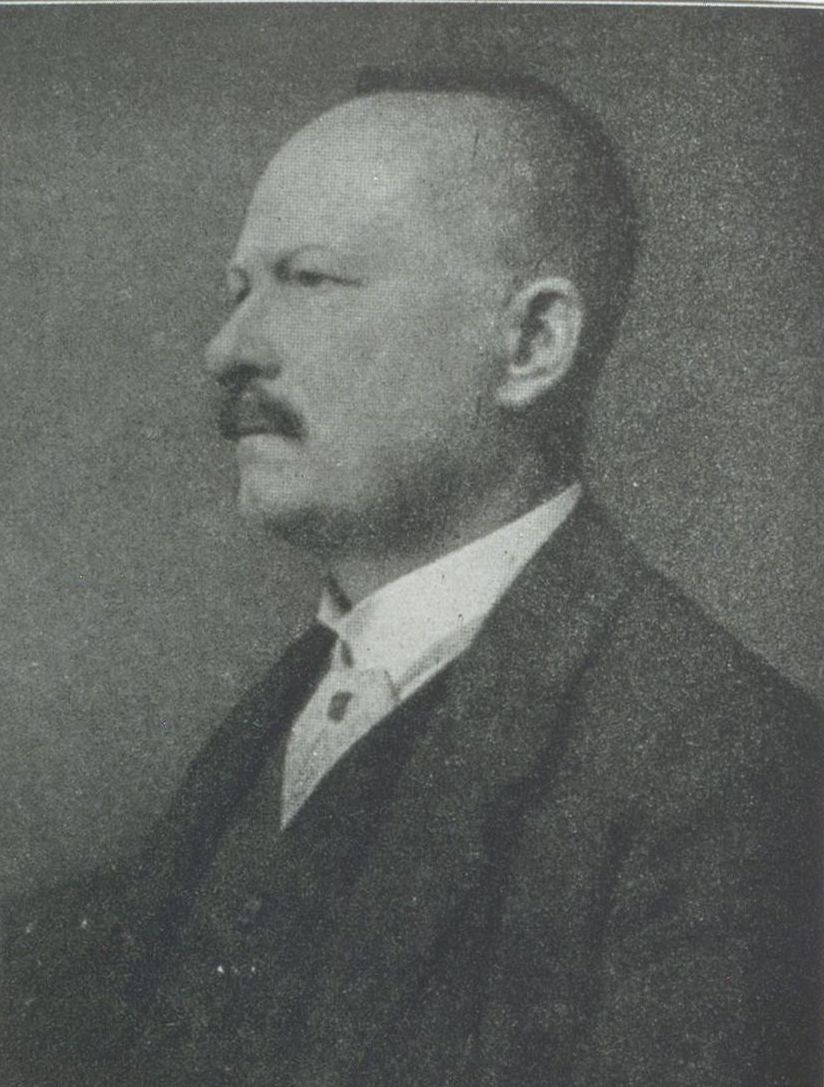 Porträtfoto von Wilhelm Gause